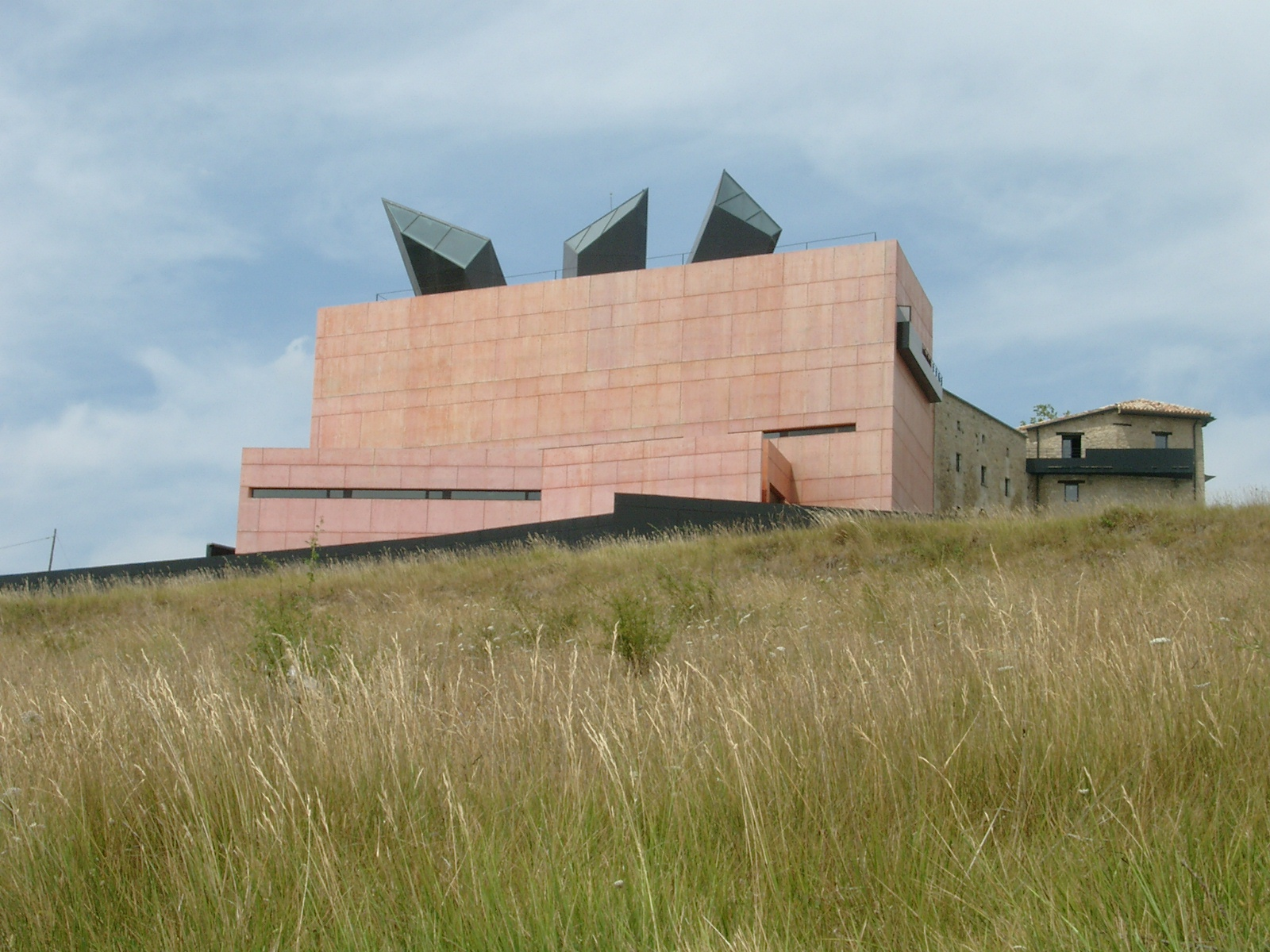 Irudia/Image: Jorge Oteitza fundazio museoa (Altzuza, Egues, Nafarroa) Egilea/Author: Josu Goñi Etxabe